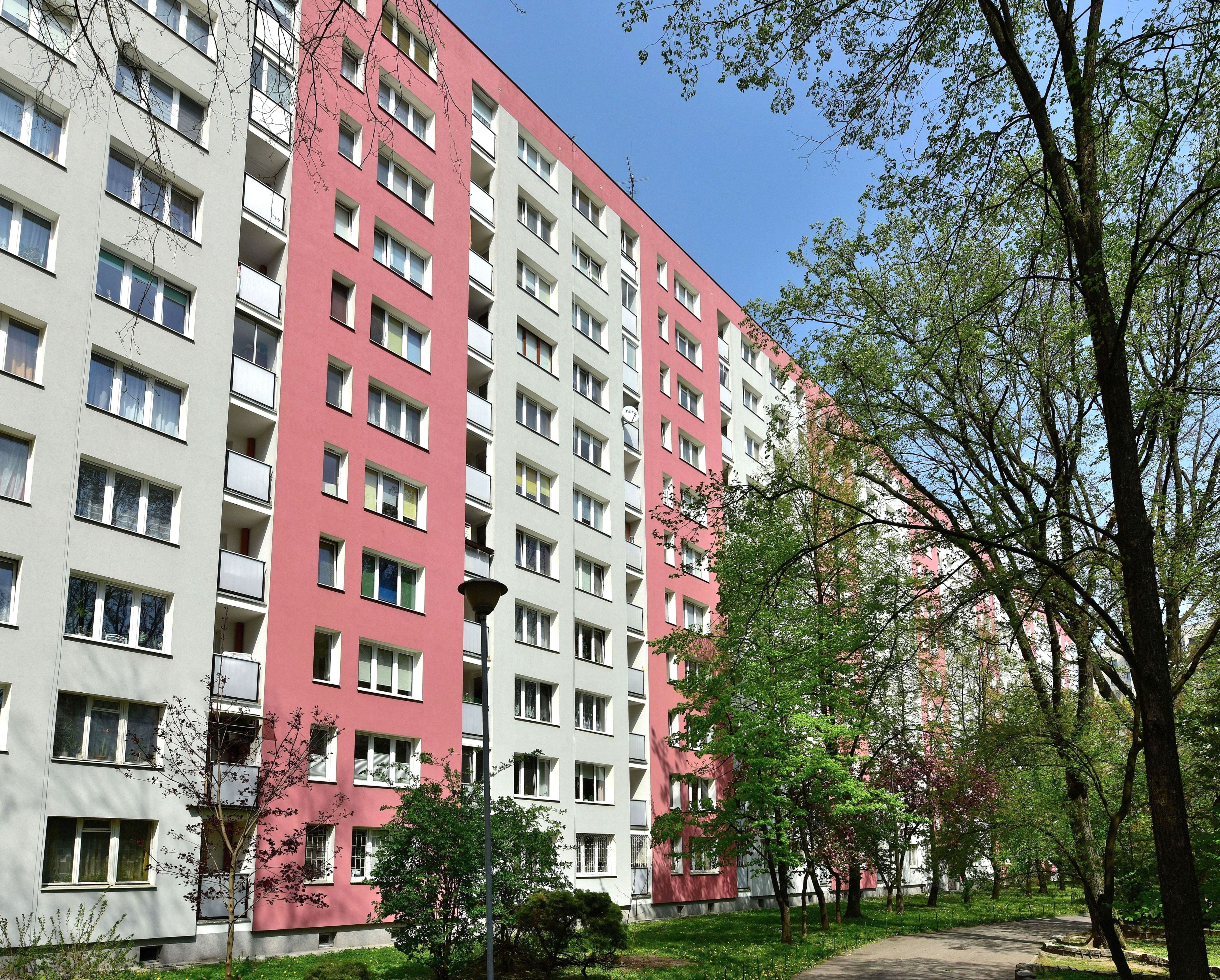 Blok mieszkalny przy ul. Lizbońskiej 2 w Warszawie